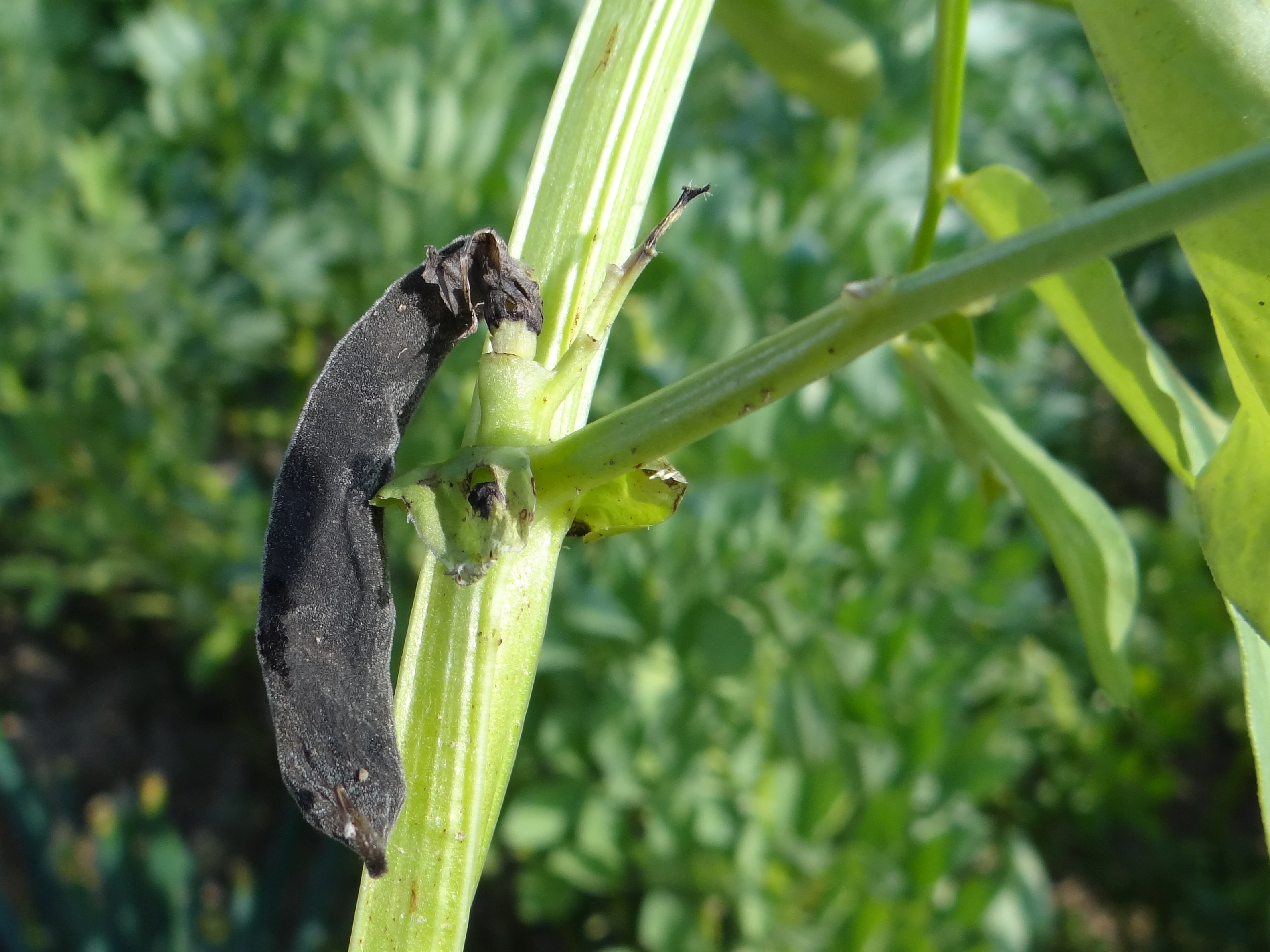 Botrytis fabae on Vicia faba